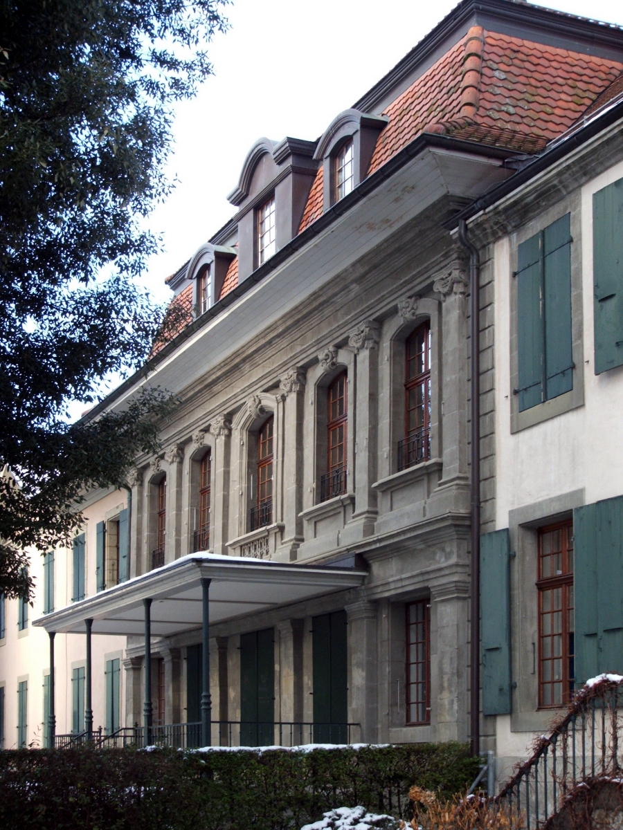 Lausanne, château de Beaulieu, corps central